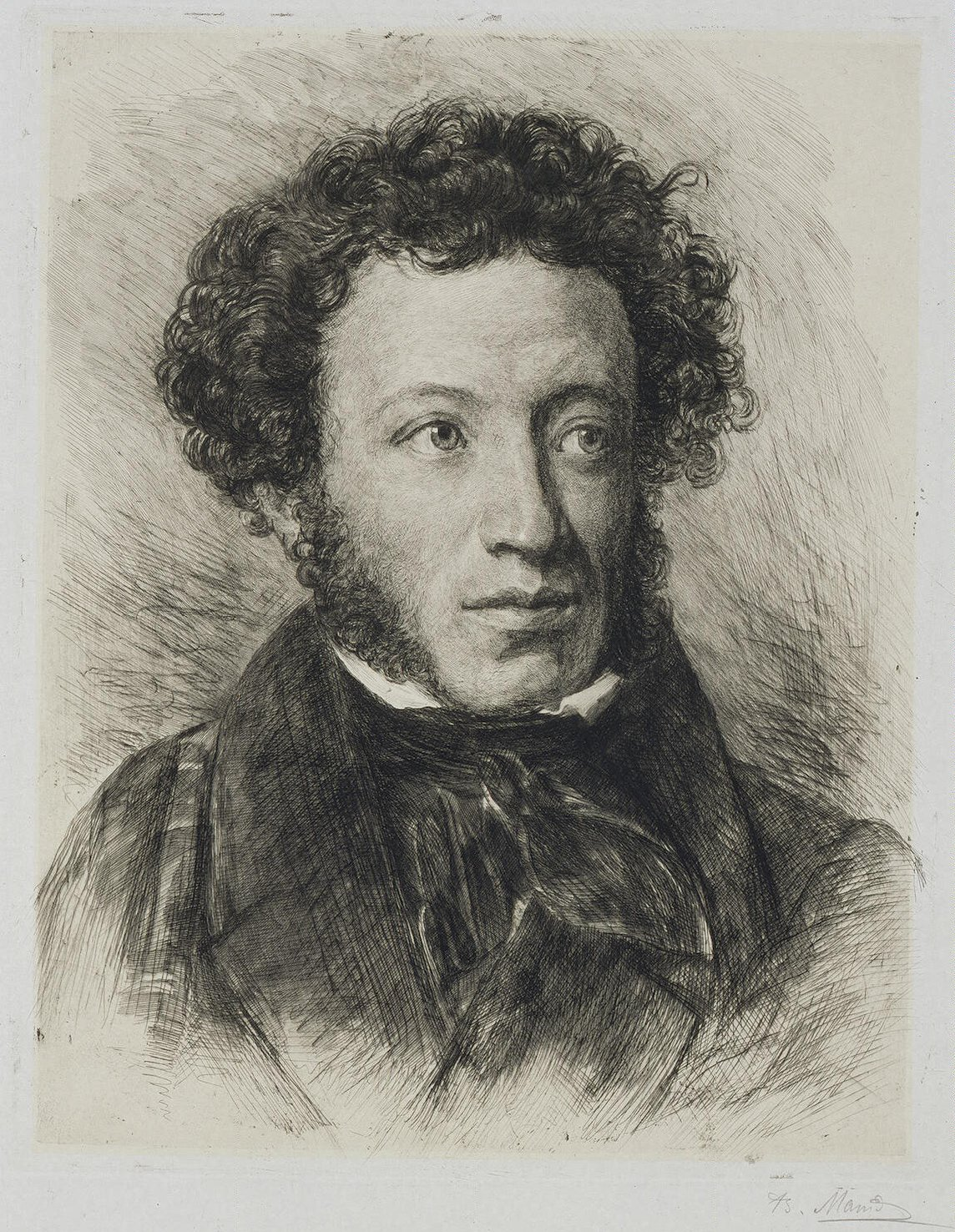 Портрет А. С. Пушкина. Гравюра Василия Матэ